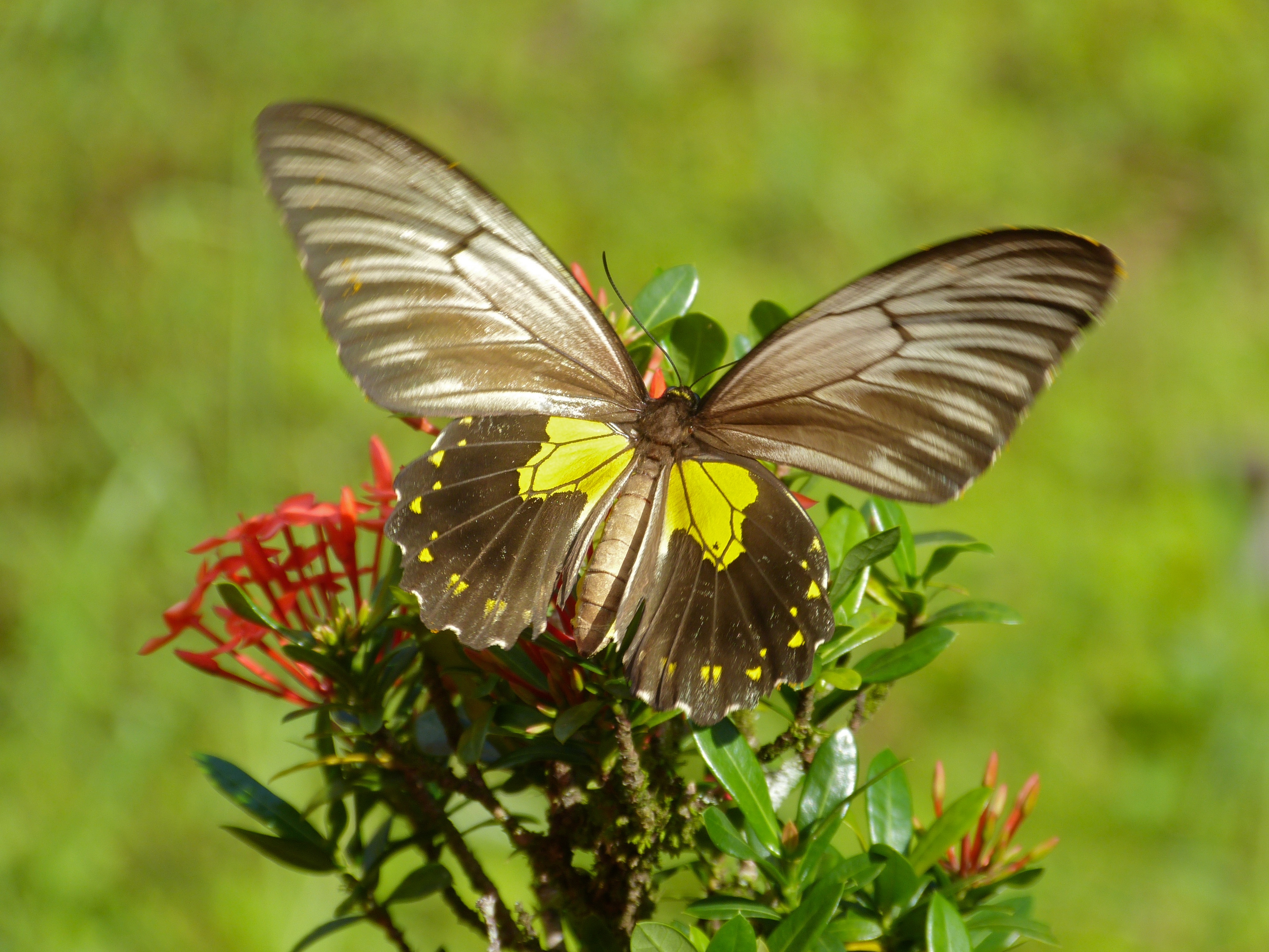 Bilit, Sabah, MALAYSIA